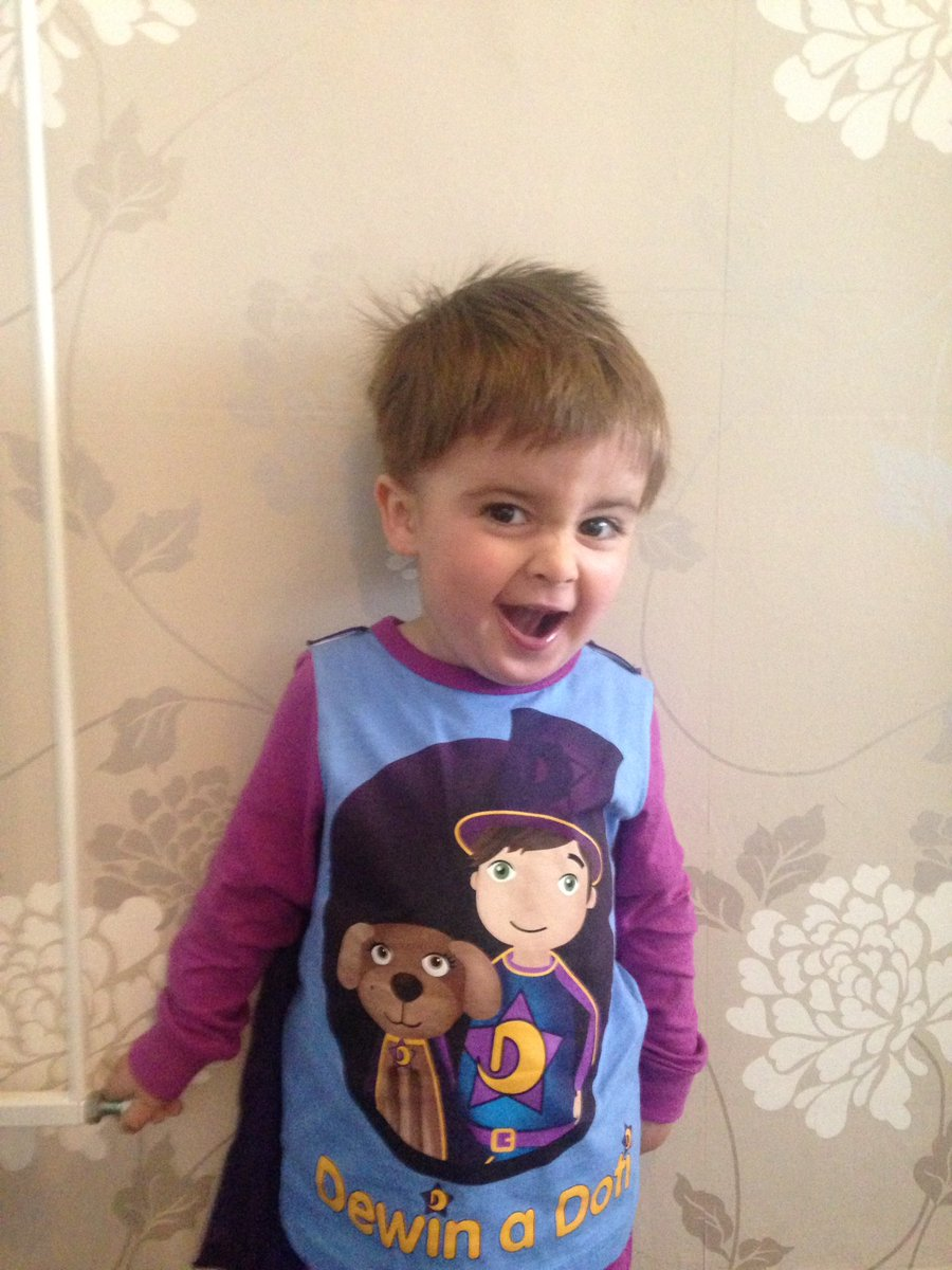 Garmon yn ei byjamas Dewin a Doti!